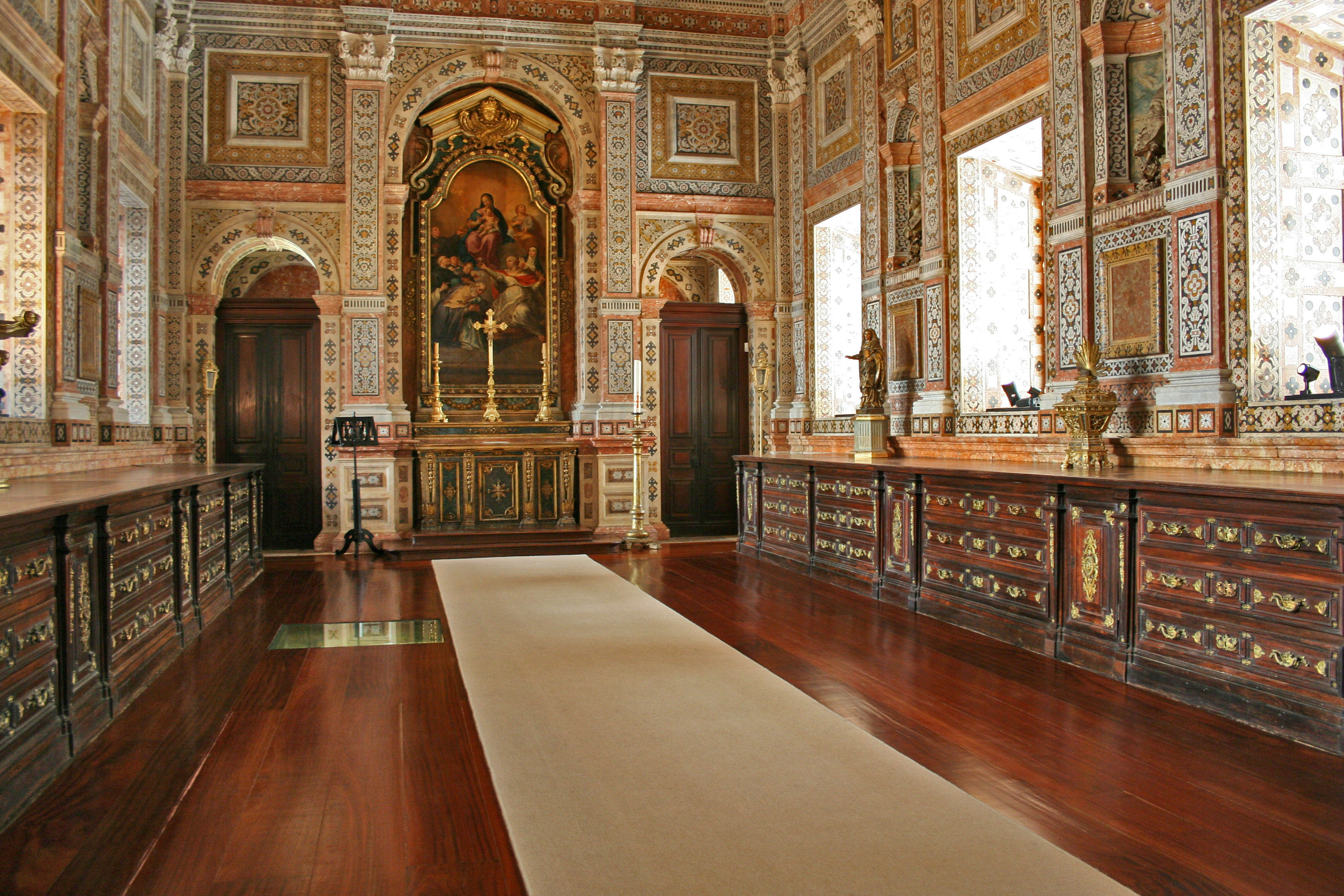 Mosteiro de São Vicente de Fora This file was uploaded for Wiki Loves Monuments in Portugal with the unique identifier 71213.